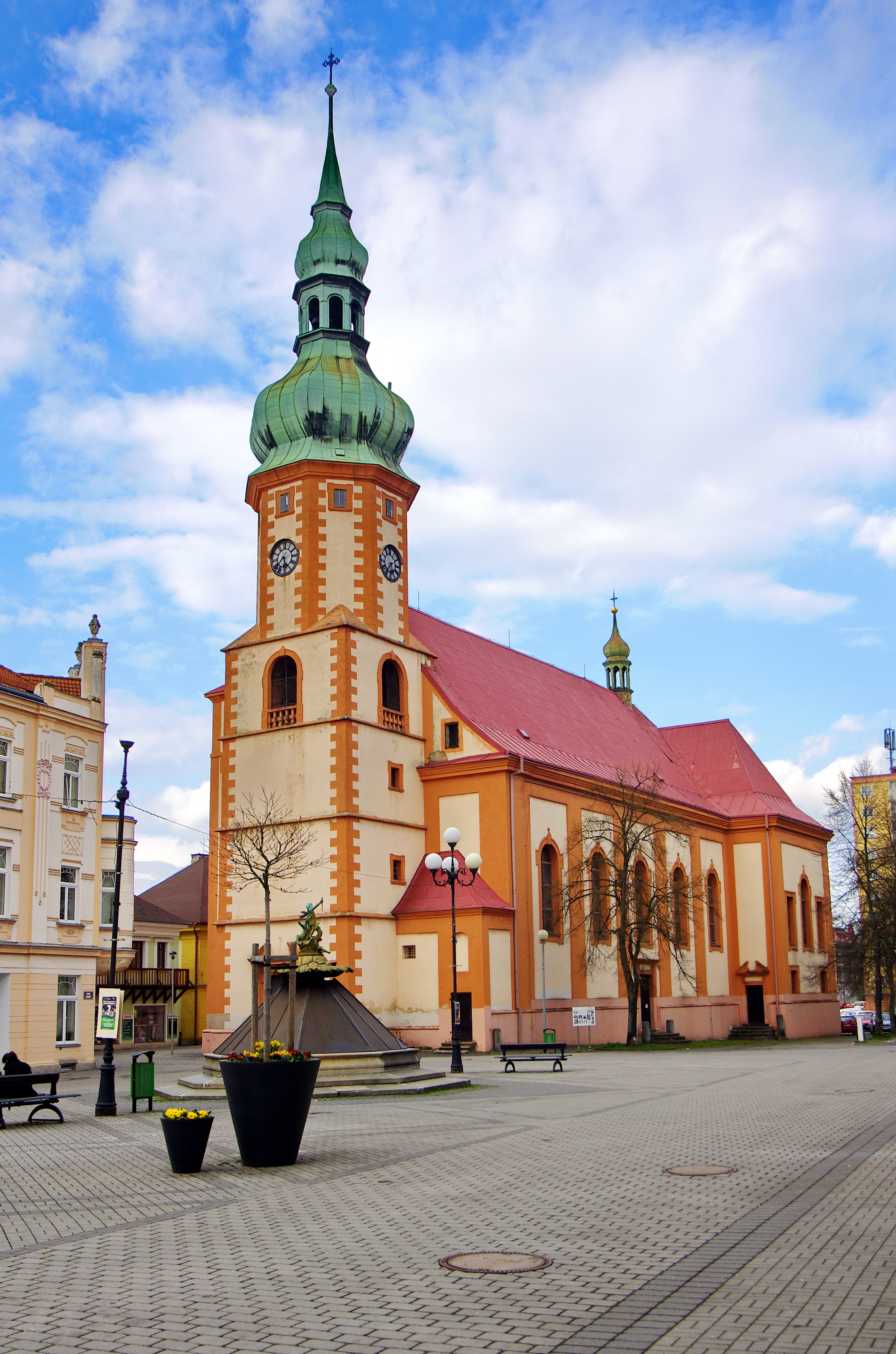 Kostel svatého Jakuba, Staré náměstí čp. 1, Růžové náměstí, Sokolov.